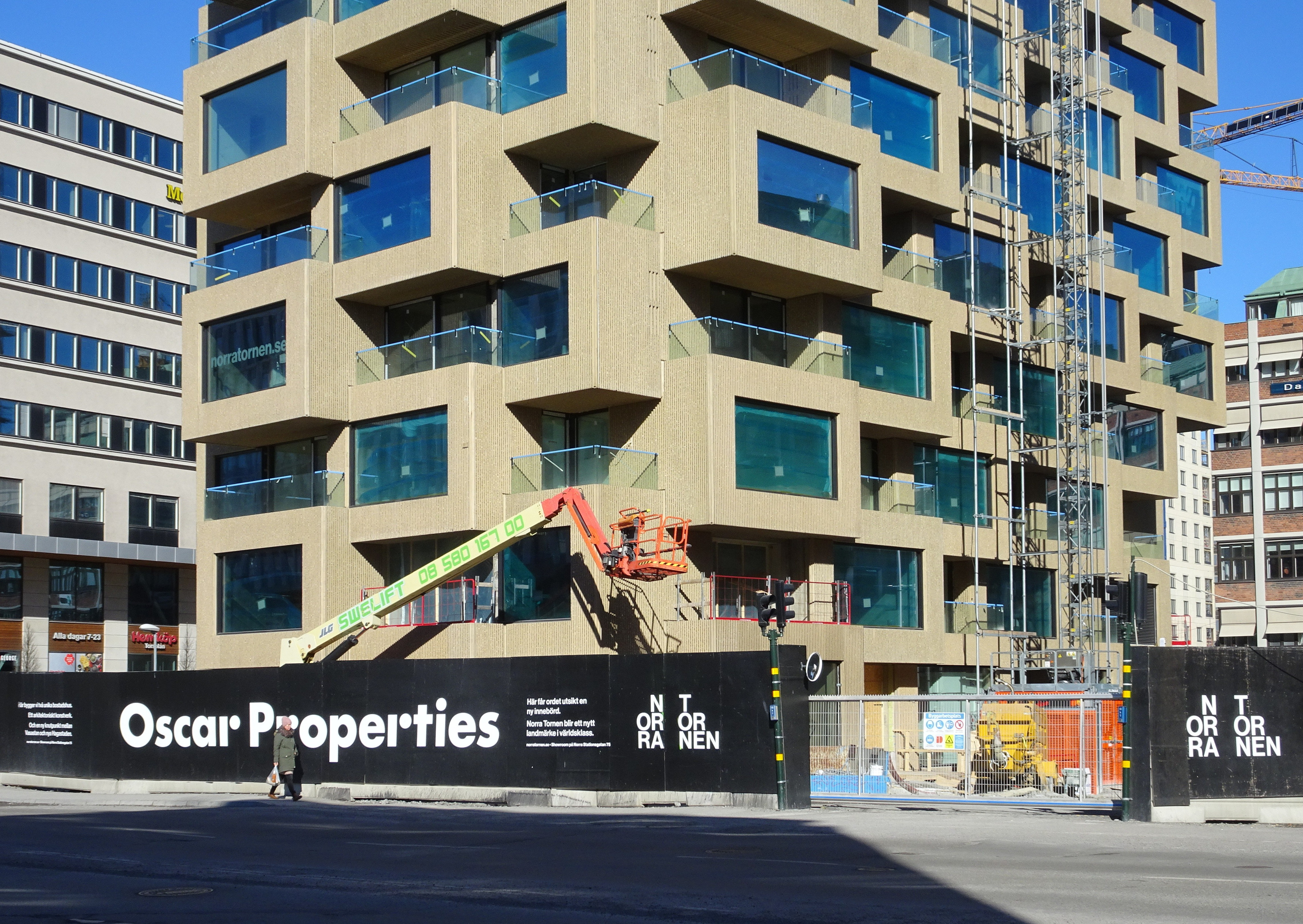 Norra Tornen under uppförande, här det östra av de båda tornen.